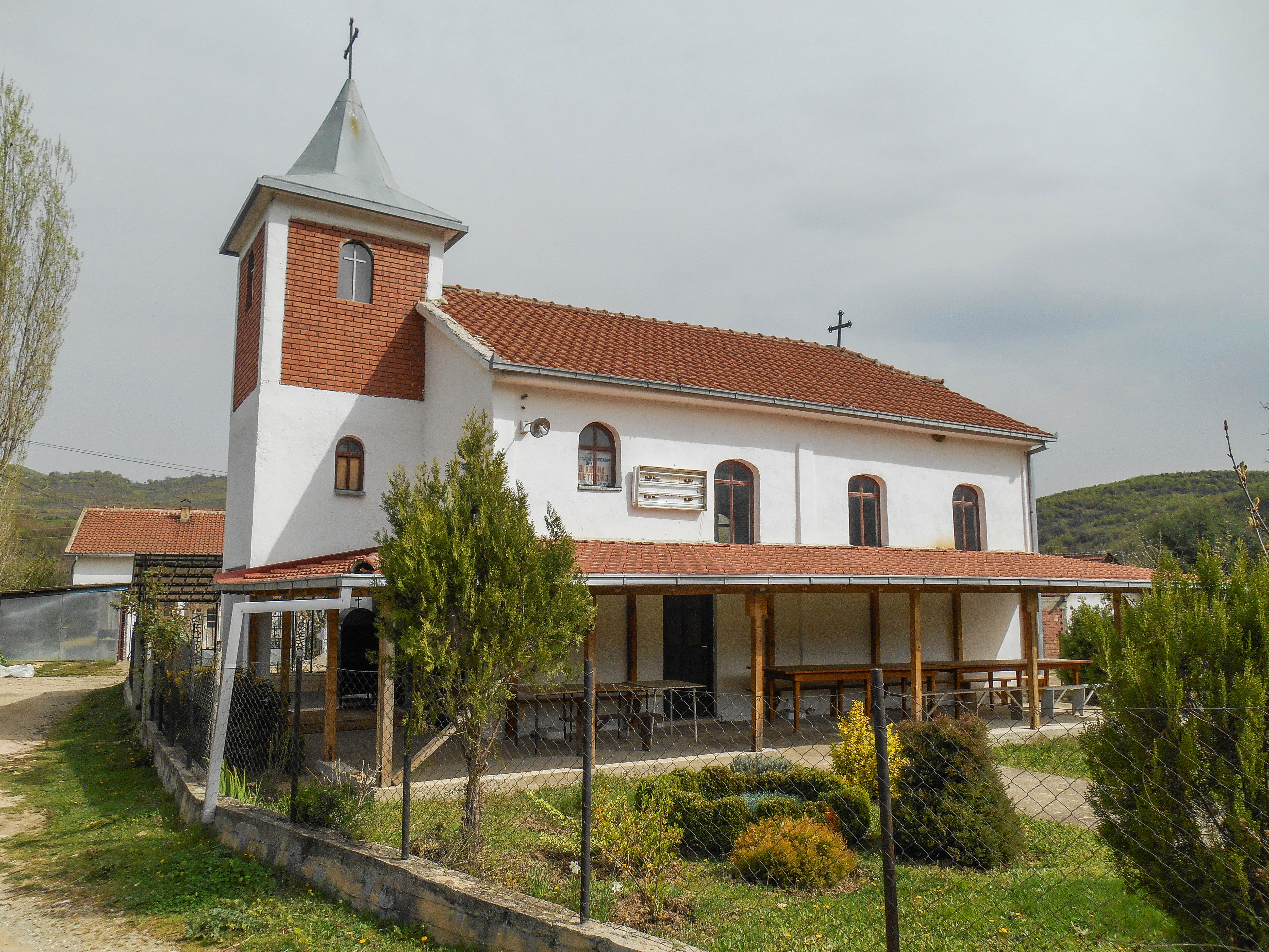 Црква Свети Кирил и Методиј